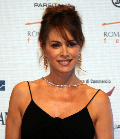 L'attrice italiana Elena Sofia Ricci al RomaFictionFest 2009.